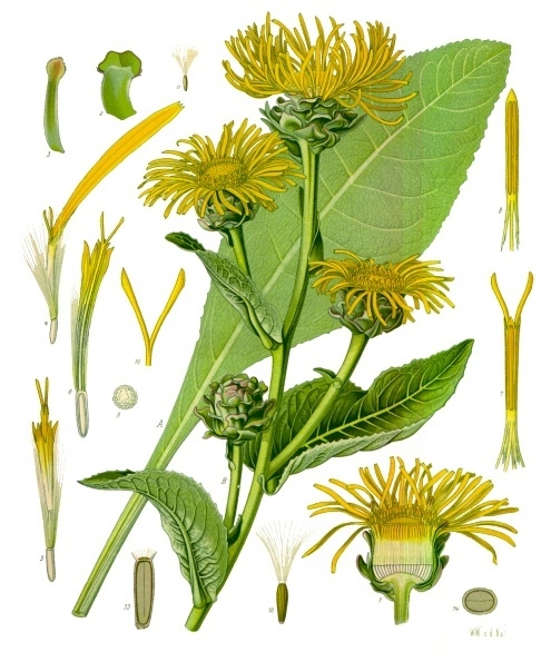 Echter Alant. A Wurzelblatt, kleines Exemplar, natürl. Grösse; B oberer Theil der blühenden Pflanze, desgl.; 1 Blüthenkorb im Längsschnitt, desgl.; 2 und 3 äusseres und inneres Hüllkelchblatt, etwas vergrössert; 4 Randblüthe, vergrössert; 5 Scheibenblüthe, desgl.; 6 letztere im Längsschnitt, desgl.; 7 Staubgefässröhre mit hervorstehenden Narben, desgl.; 8 einzelnes Staubgefäss, desgl.; 9 Pollen, desgl.; 10 Narben, desgl.; 11 und 12 Frucht mit Pappus, natürl. Grösse und vergrössert; 13 und 14 dieselbe im Längs- und Querschnitt.